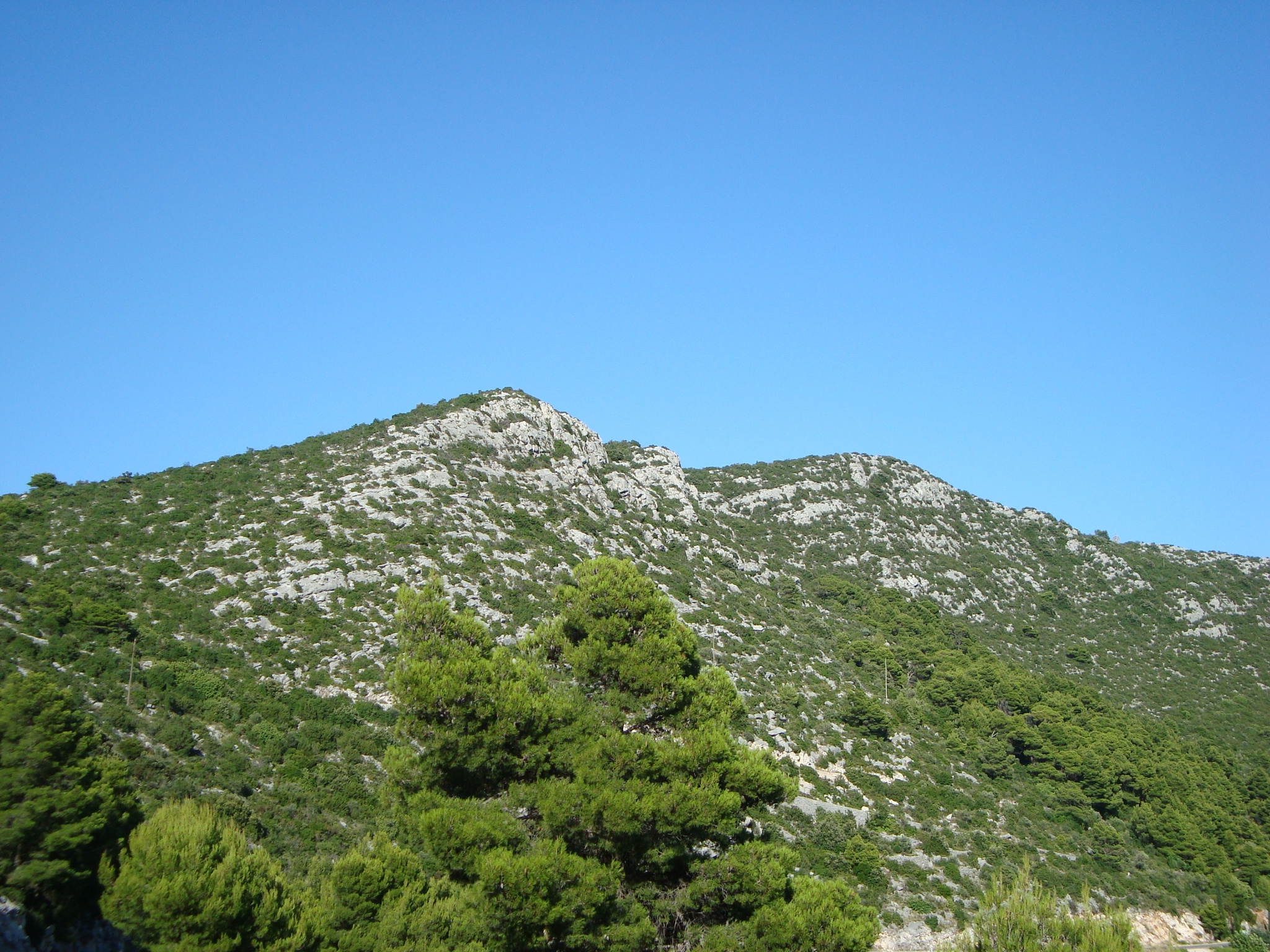 Vrhmljeće, mjesto prvog naselja na otoku Mljetu